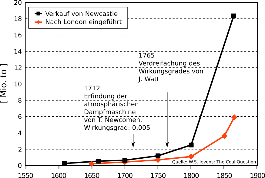 Kohleverbrauch in England und Entwicklung der Dampfmaschine